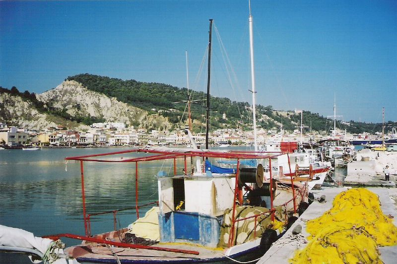 Zakynthos, město a přístav, Řecko